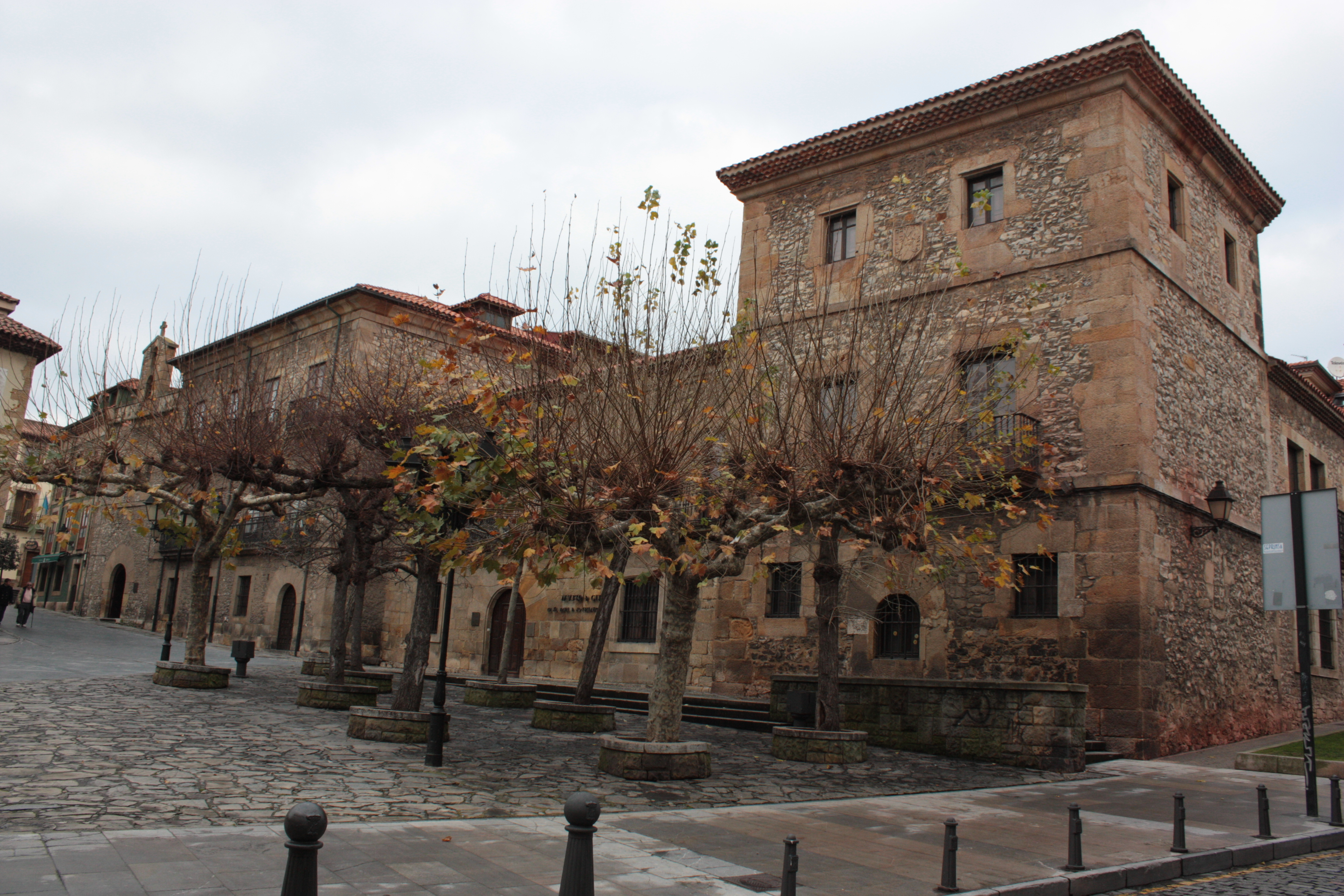 Casona de Jovellanos